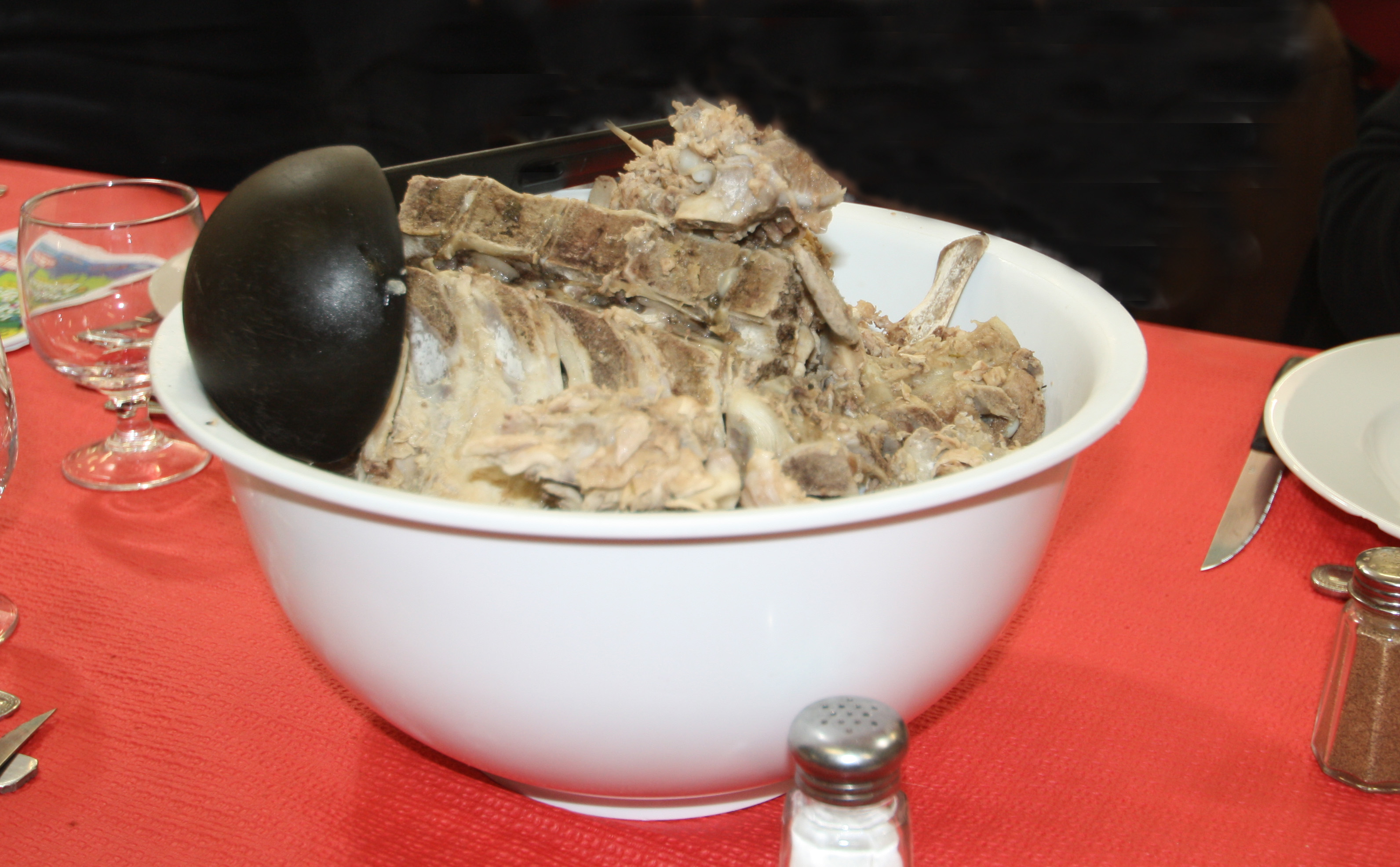 Nages (Tarn) - repas des os (de cochon).